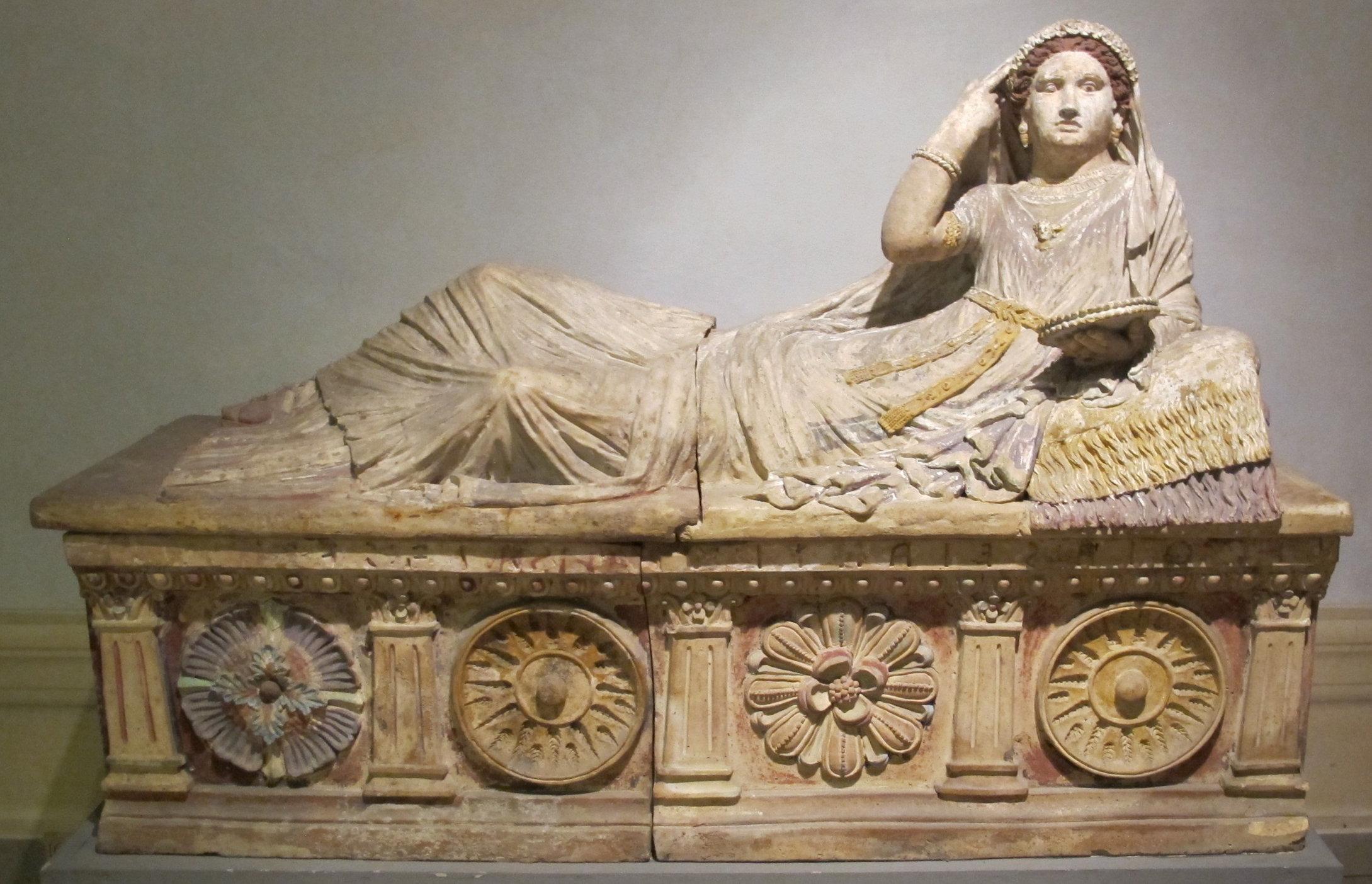 Sarcofago di larthia seianti